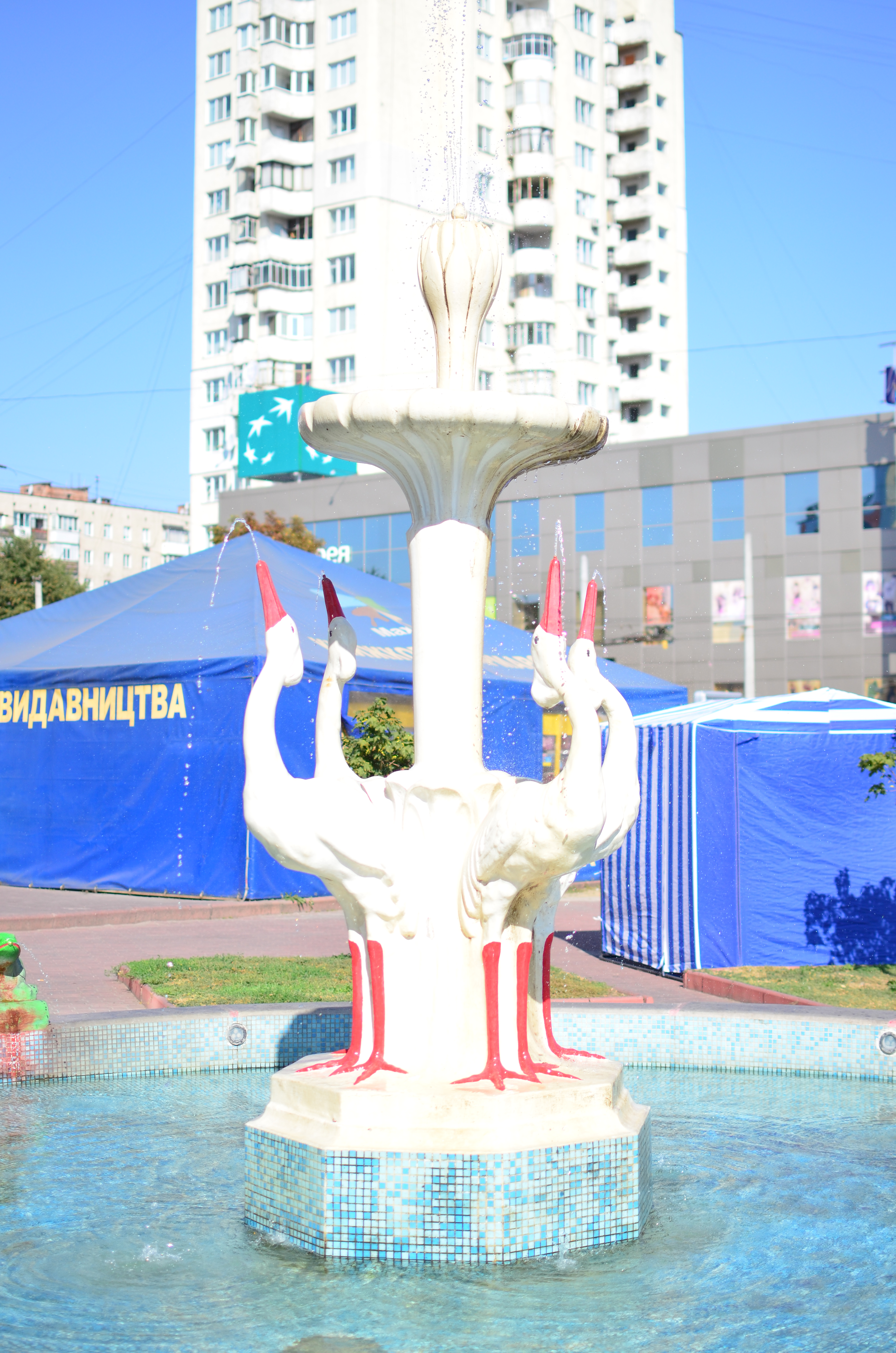 Хмельницкий. Фонтан с жабками и аистами на Проскуровской.